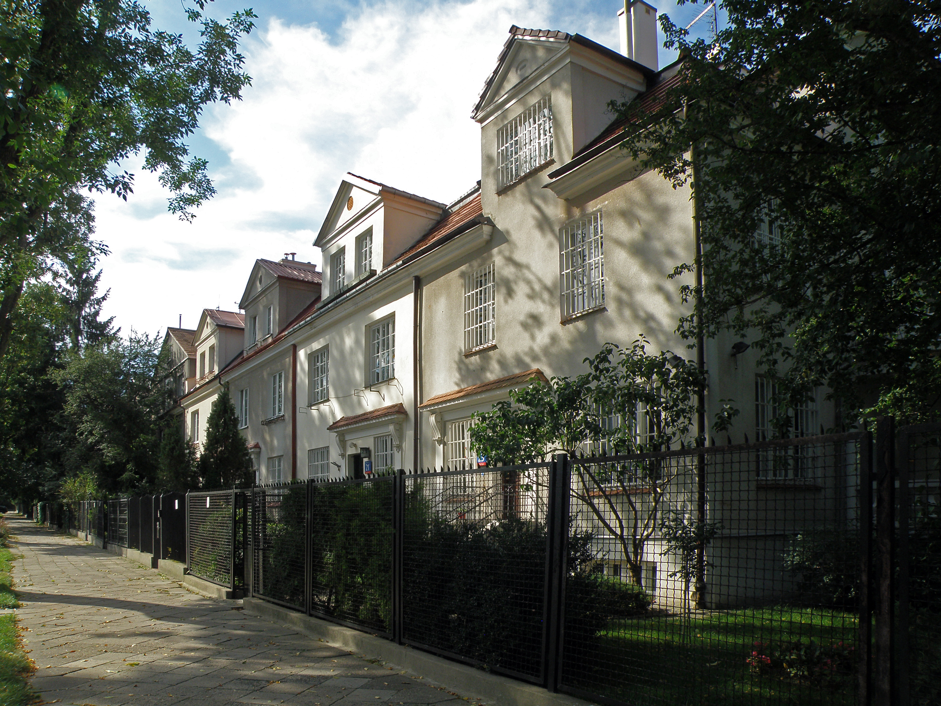 Dom, ok. 1930, ul. Obrońców 23 (966 A z 13.06.1979), Warszawa.